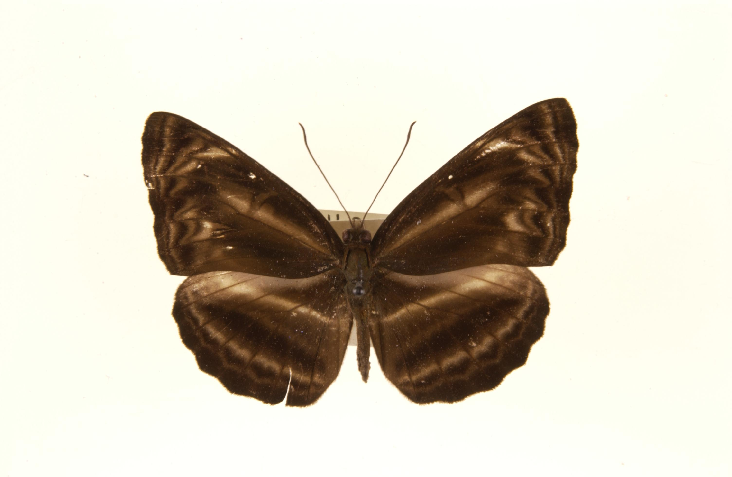 Neptis harita Malaya